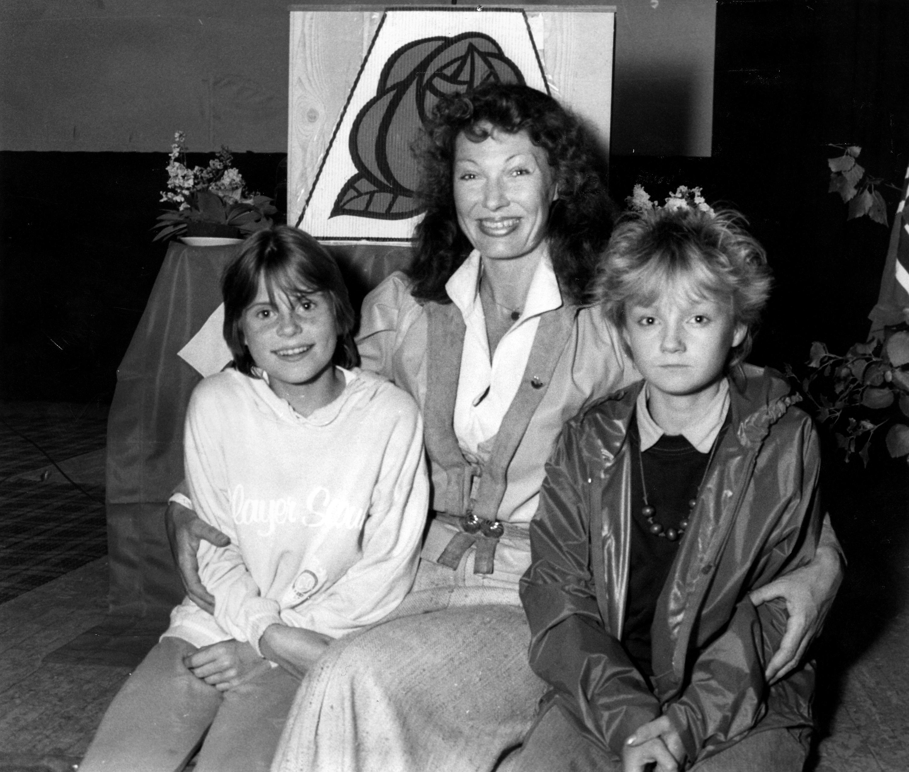 Åse Kleveland